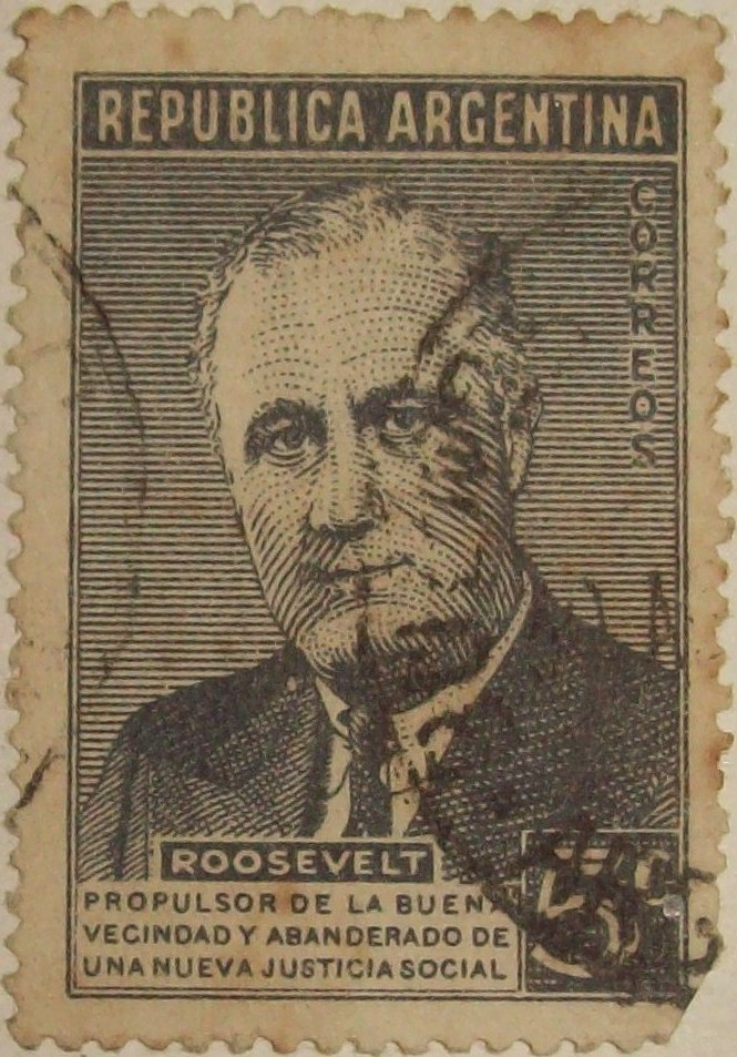 Es una foto de una estampilla argentina en comemoración al presidente estadounidense Franklin D. Roosevelt.